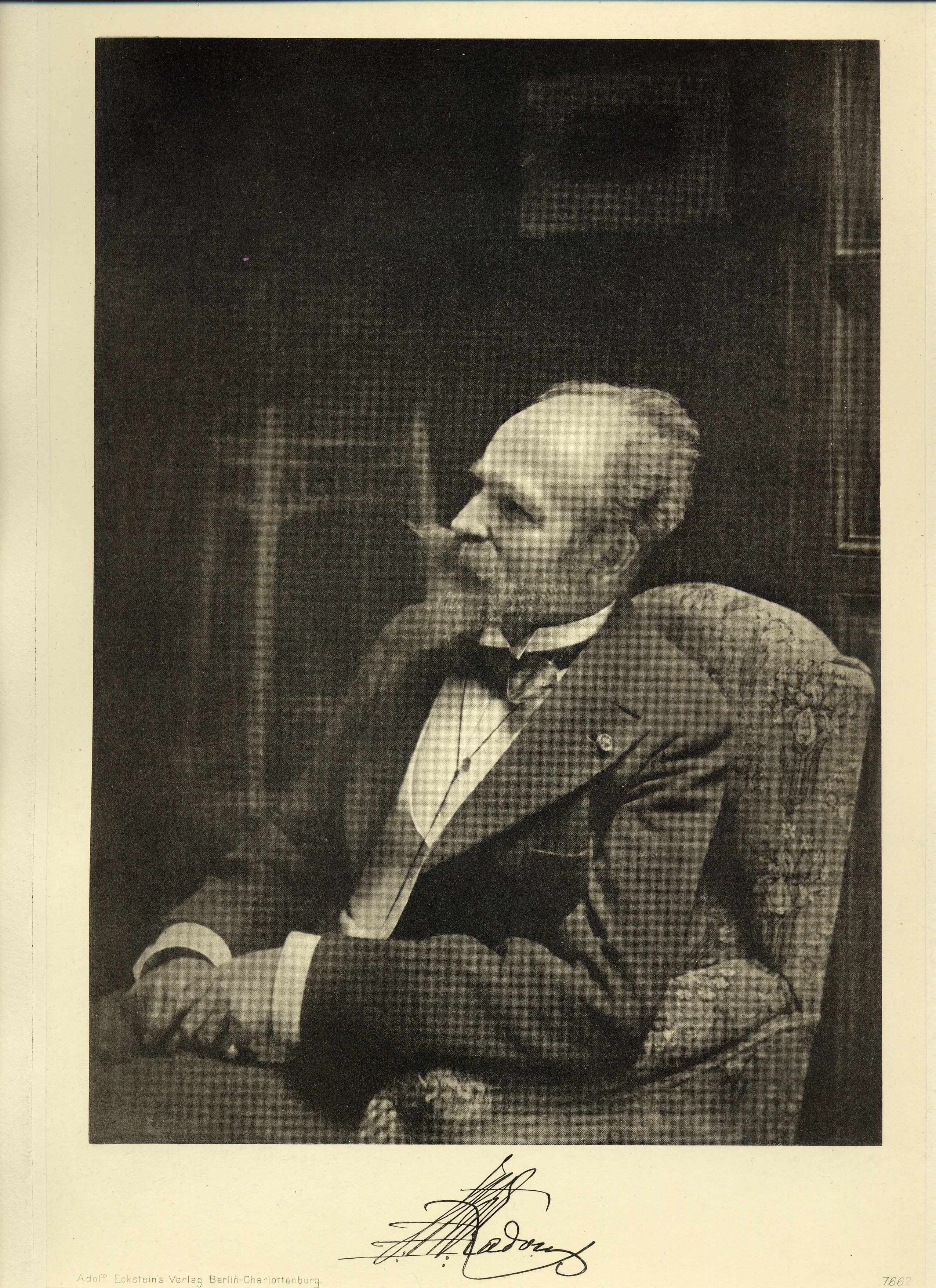 Portrait de Jean Théodore Radoux vers 1900 paru dans "La Belgique d'aujourd'hui", sous la direction de Gustave DELTOUR, Berlin-Charlottenburg, Adolf Eckstein, vers 1908. Scannée et mise en forme par Henrotte Damien le 13 janvier 2007.